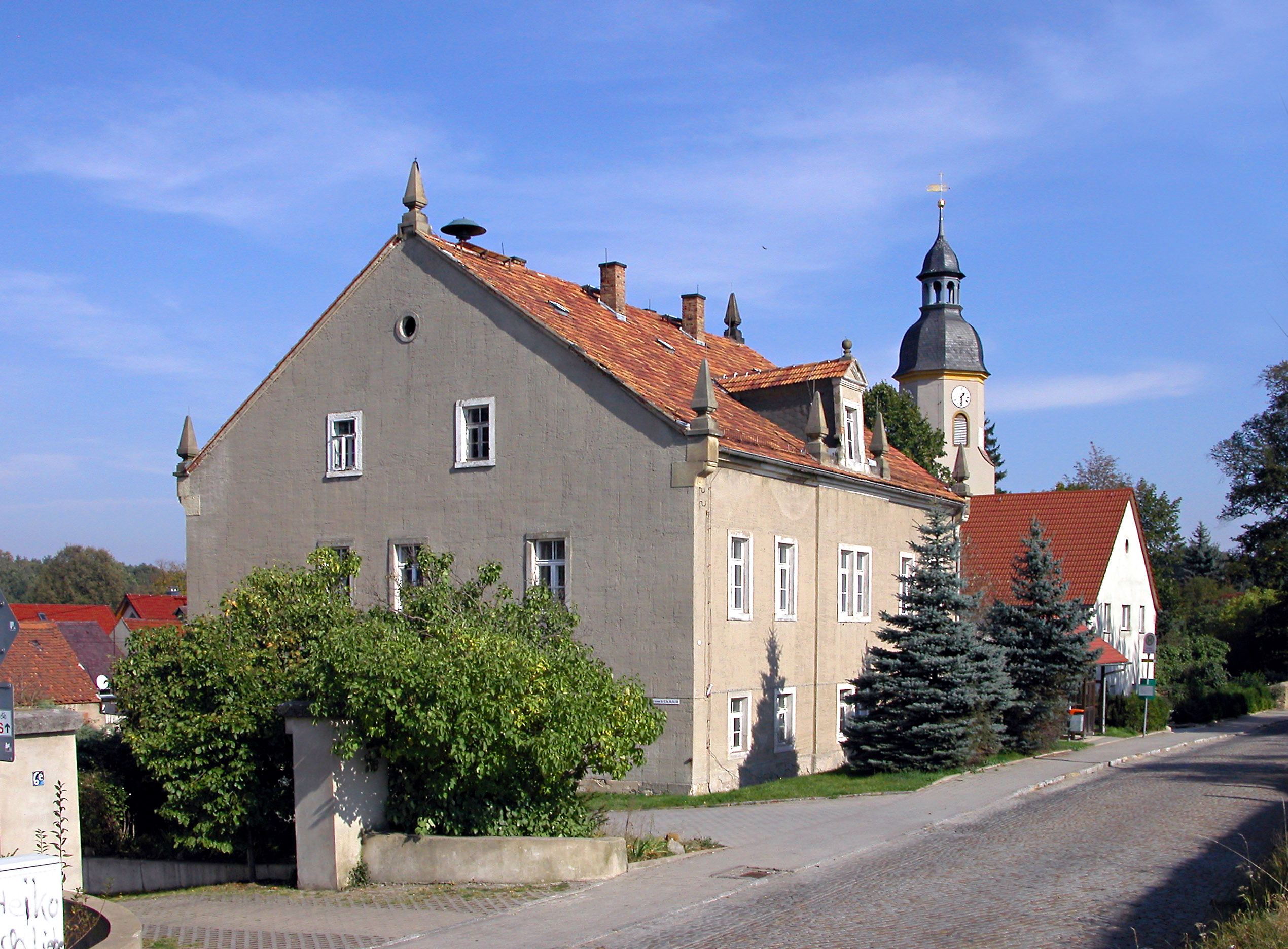 10.10.2005 01458 Grünberg (Ottendorf-Okrilla), Lausaer Straße 6: Rittergut Grünberg, Herrenhaus (GMP: 51.162517,13.841888) von Südwesten. 1413 Ersterwähnung. Heutiges Herrenhaus nach Brand von 1884 errichtet. Das Rittergut wurde 1945 aufgeteilt, in den Scheunen und Stallungen richtete man Wohnungen ein. In der DDR-Zeit war im Erdgeschoß des Herrenhaus war eine Arzstation und bis 1994 die Gemeindeverwaltung. Im Hintergrund die barocke Dorfkirche. [DSCN7697.TIF]20051010055DR.JPG(c)Blobelt